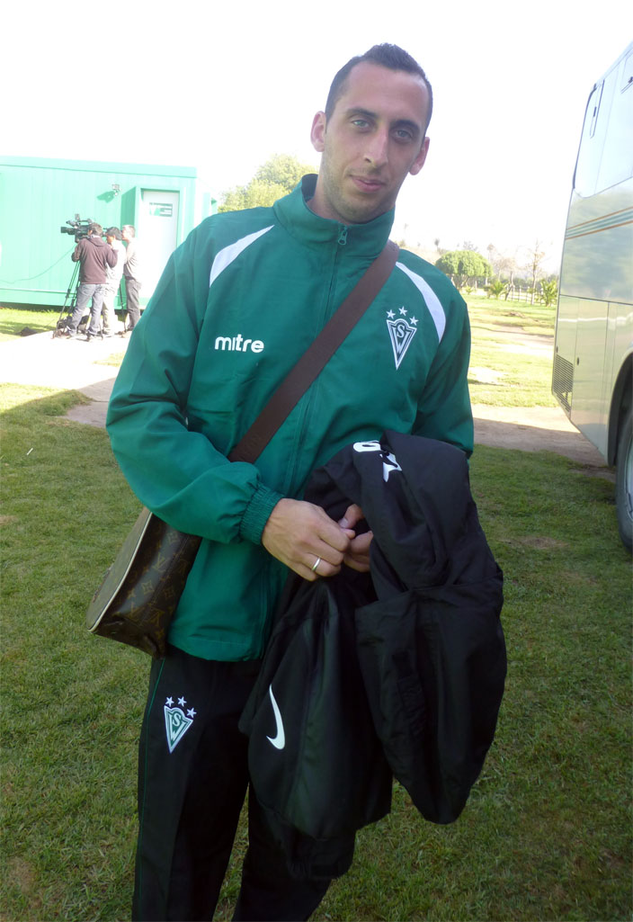 Fotografia de Mauricio Prieto, jugador uruguayo profesional de futbol que actualmente juega por el Santiago Wanderers de Chile.